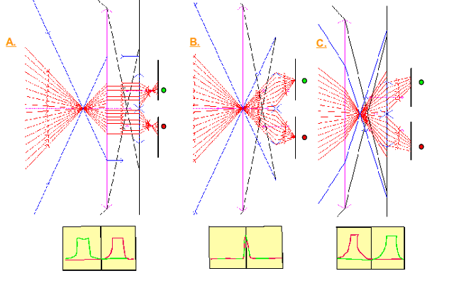 L'objectif donne 3 cas distincts suivant la position de la source ponctuelle (ici sur l'axe). Pour le cas A, l'image est formée avant le capteur principal ou film, le décalage des faisceaux se fait vers l'intérieur des capteurs. Pour le cas B, l'image se forme sur le film, les capteurs on Pour le cas C, l'image se forme derrière le film, le décalage des faisceaux se fait vers l’extérieur des capteurs.